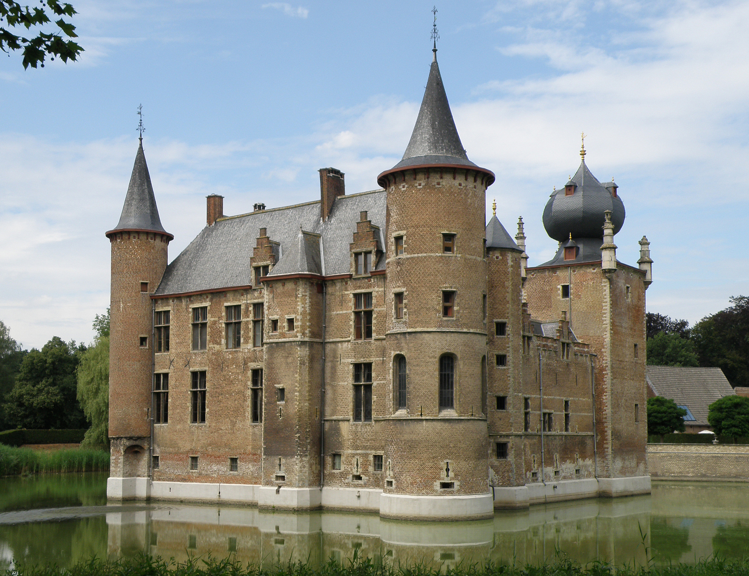 Aartselaar (prov. Antwerpen, België). Kasteel Cleydael.